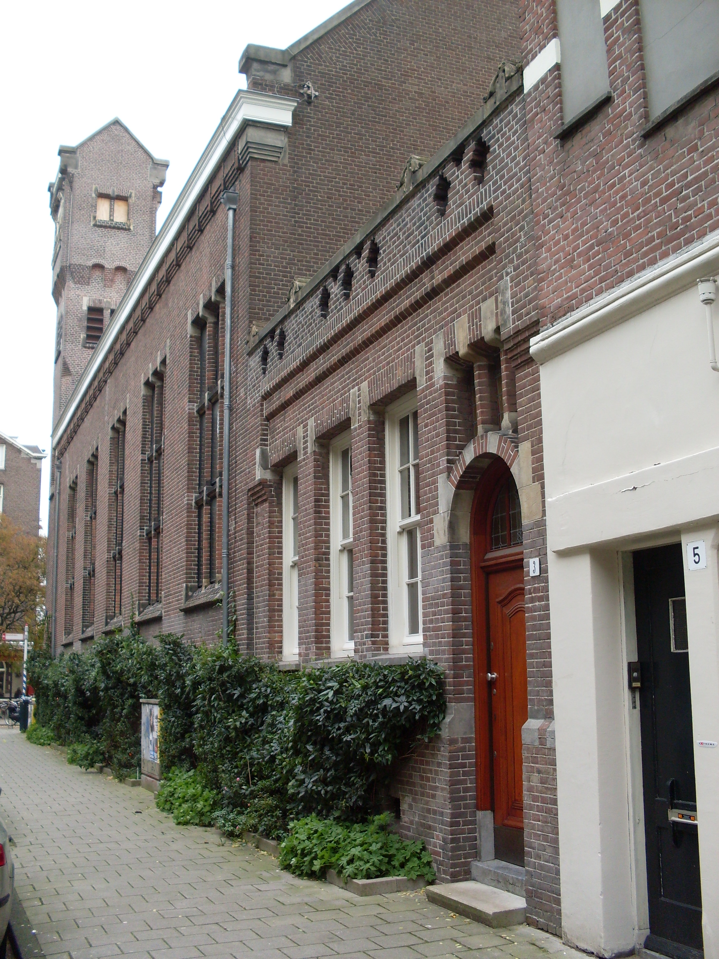 Pieter Basstraat 3